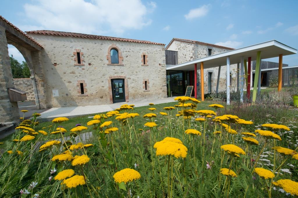 Le jardin d'accueil et la Maison des libellules - Photo : SPL Pays de la Loire Environnement et Biodiversité - J. Auvinet